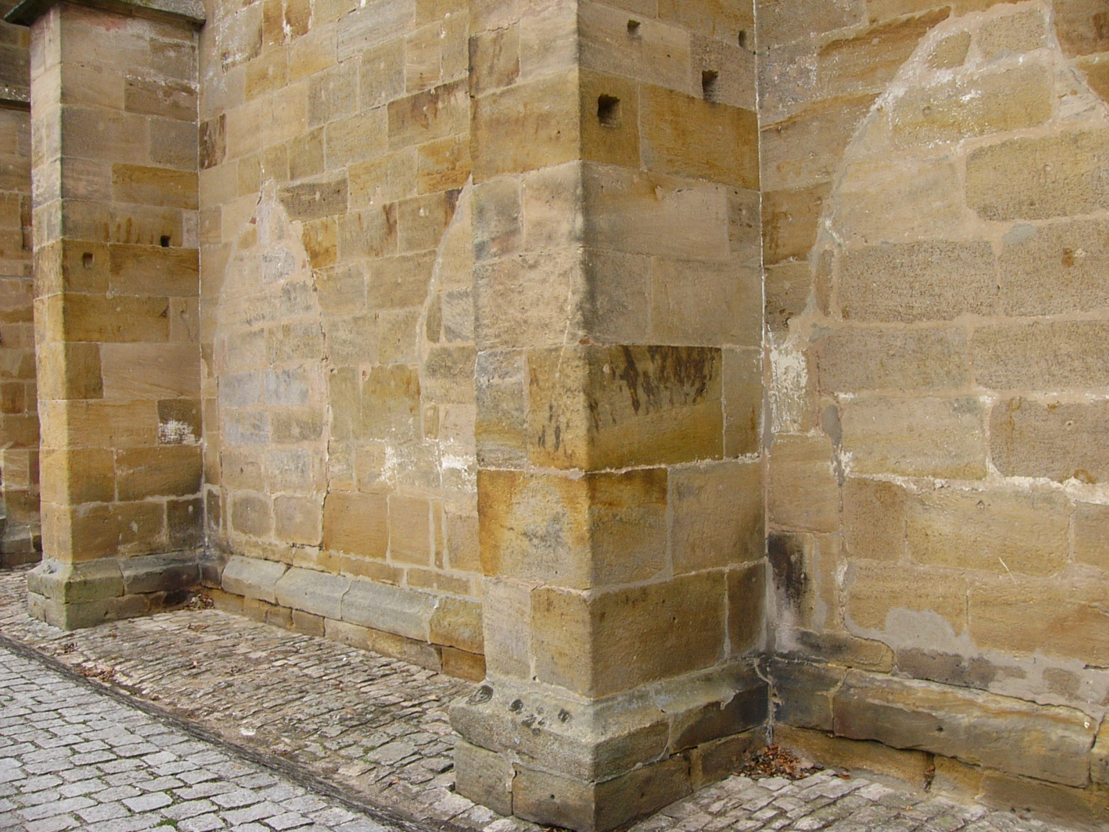 Spuren des Kreuzgangs an der Außenseite der Kirche